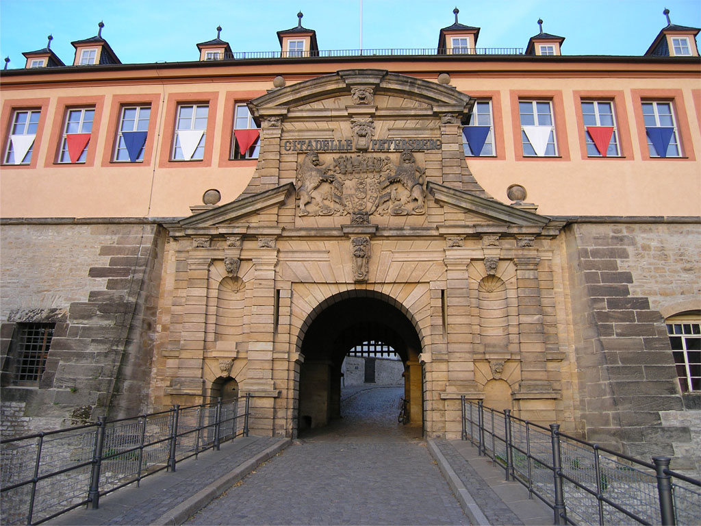 Peterstor (errichtet zwischen 1666 und 1668) mit Amtswappen von Johann Philipp von Schönborn, Haupttor der Zitadelle Petersberg in Erfurt